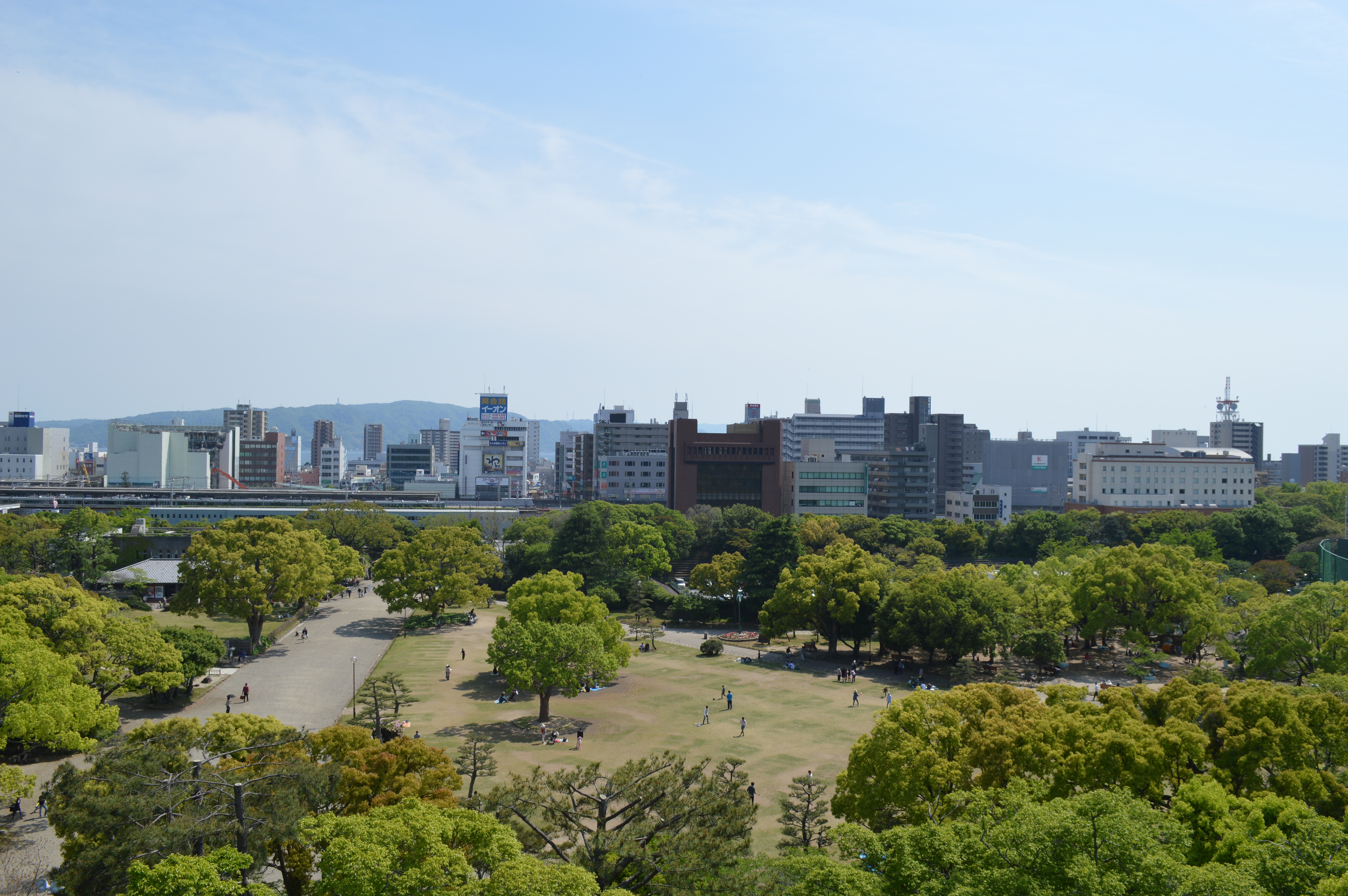 兵庫県立明石公園から明石駅方向を望む